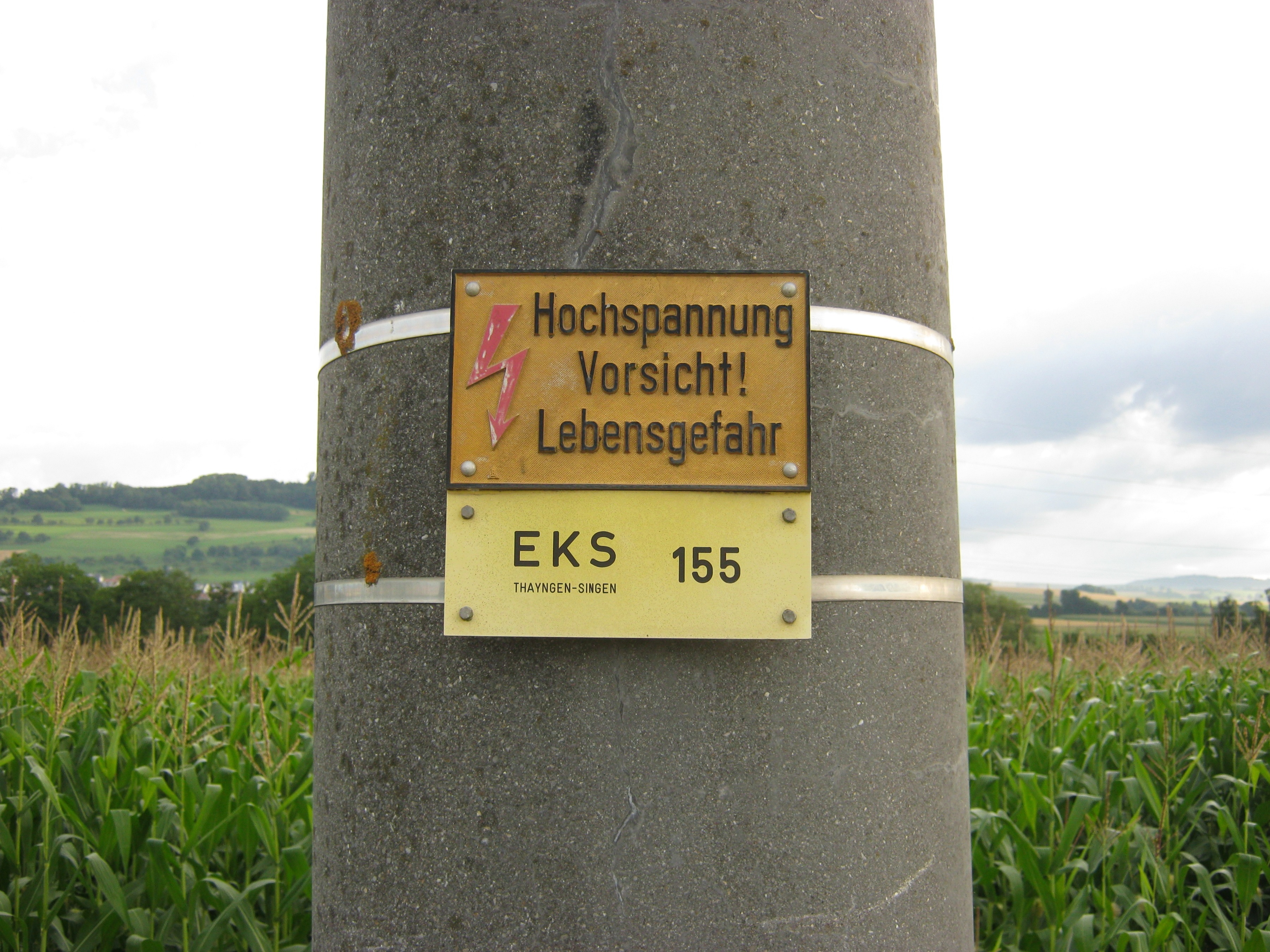 Schild an einem Mast der EKS nördlich von Bietingen in Riedheim (Hilzingen)